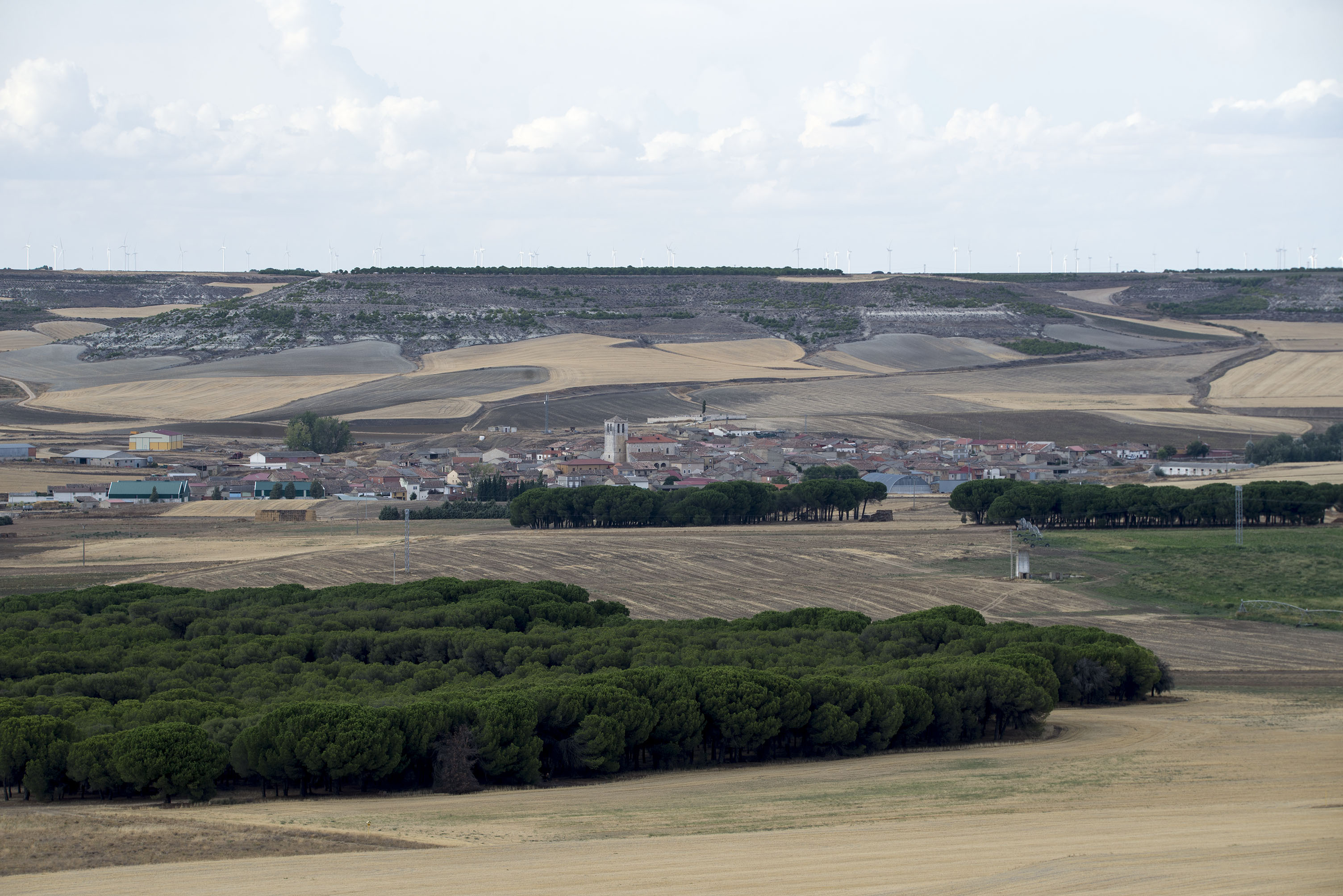 Vista Panorámica de Bercero